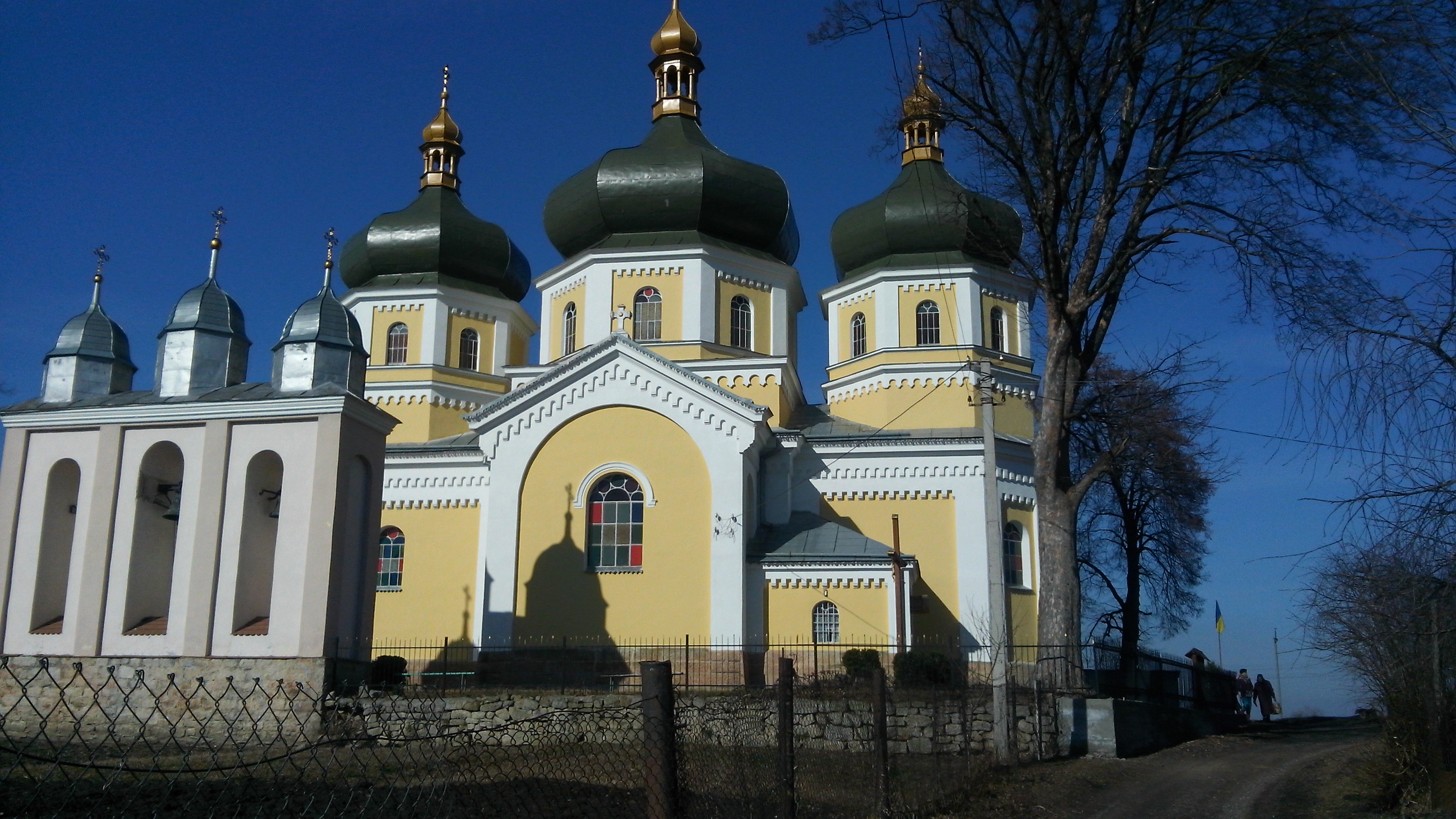 церква св. ап. Петра і Павла сучасний вигляд (2017 р.)